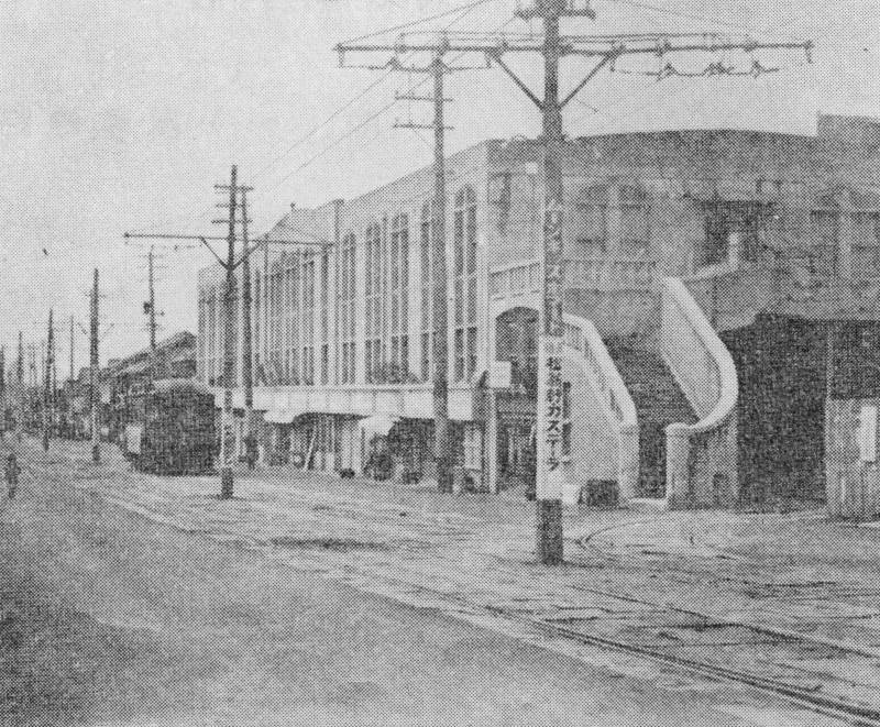 昭和初期頃の長崎電気軌道馬町車庫（現在の諏訪神社前停留所附近）。